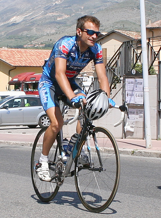 Michele Scarponi, Serhiy Honchar, Giro de Italia 2005